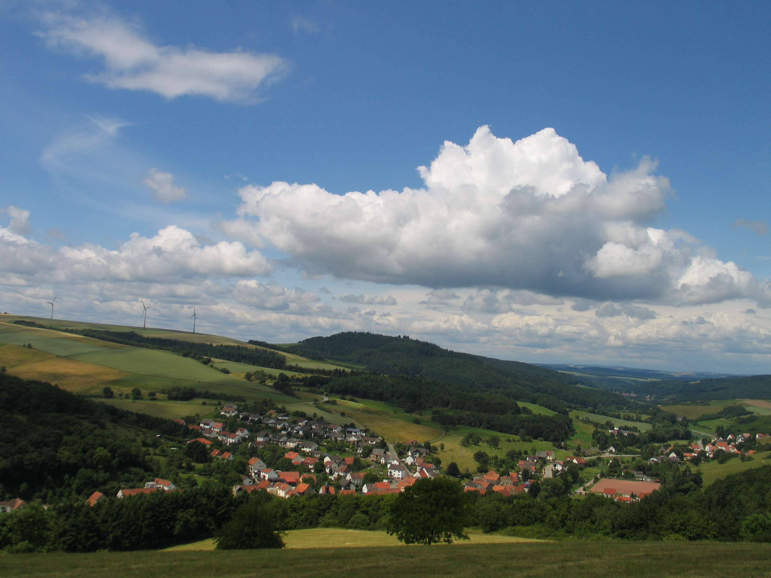 Ortsansicht von Hefersweiler